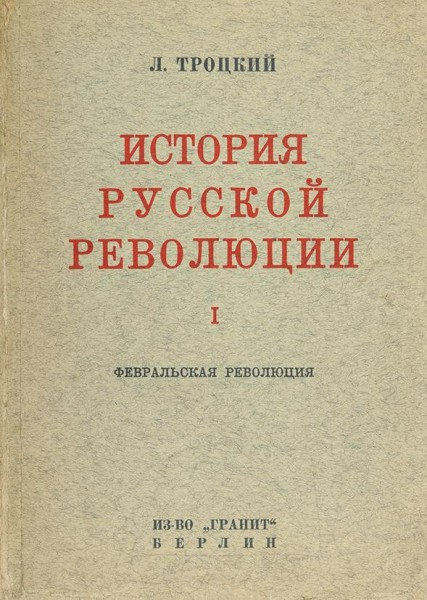 Троцкий - История русской революции, Т.1, 1930 - обложка